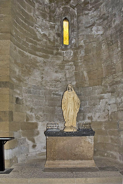 Cathédrale_de_Maguelone-Chapelle_de_la_Vierge